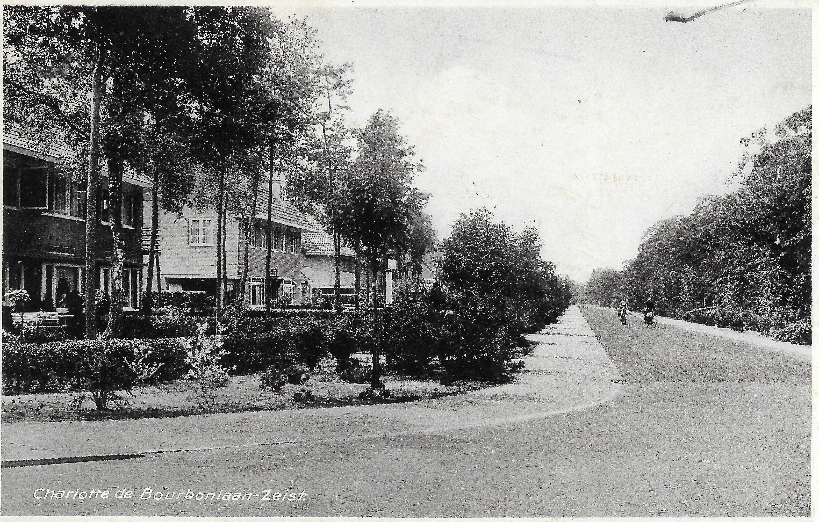 Zicht op de Charlotte de Bourbonlaan in Zeist (1938)